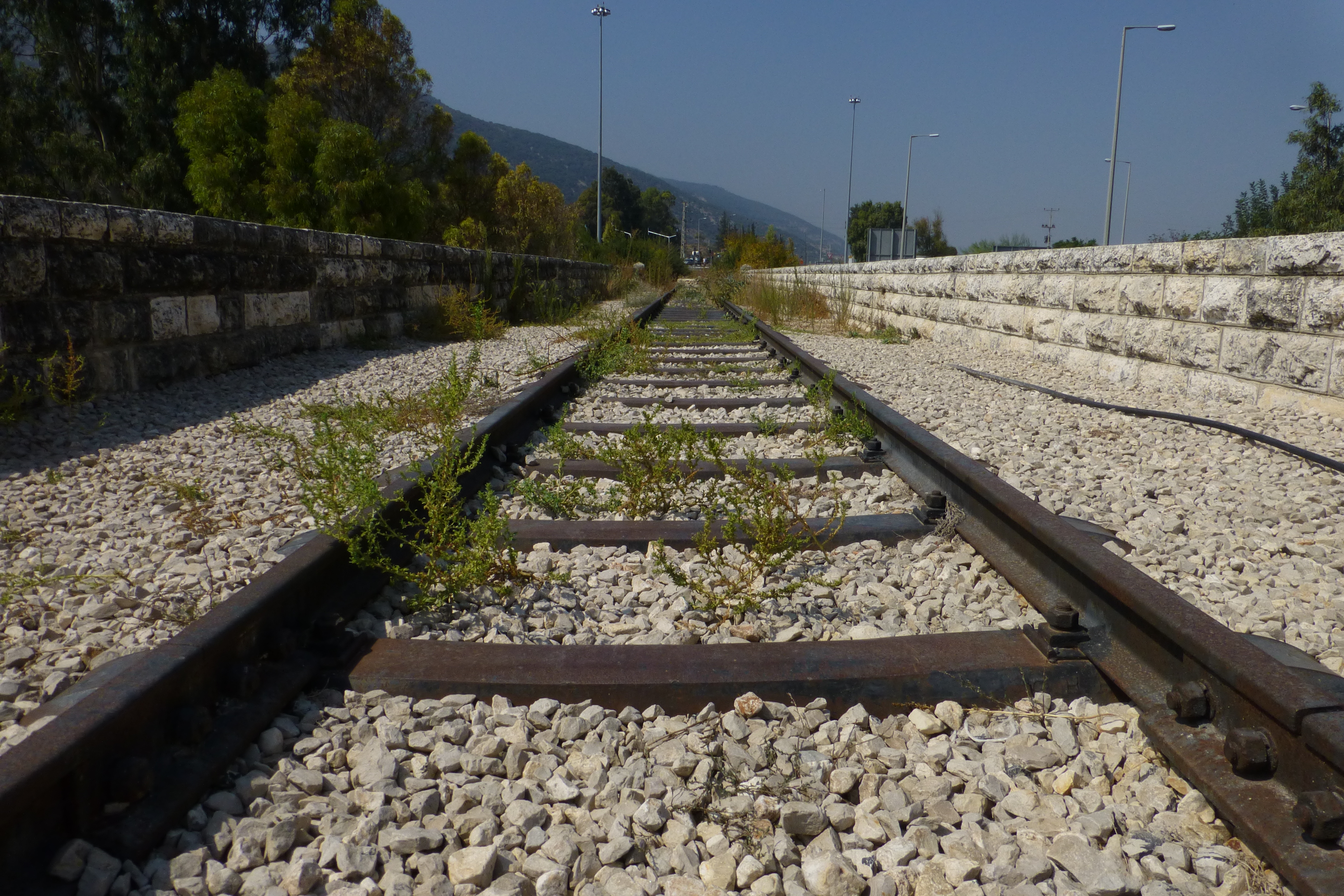 רכבת העמק - מעבירי מים והסוללה - צומת העמקים